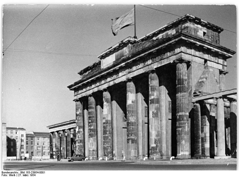 Berlin, Brandenburger Tor, Ruine Zentralbild Weiß 27.3.1954 Brandenburger Tor Berlin. Aufnahmen vom März 1954